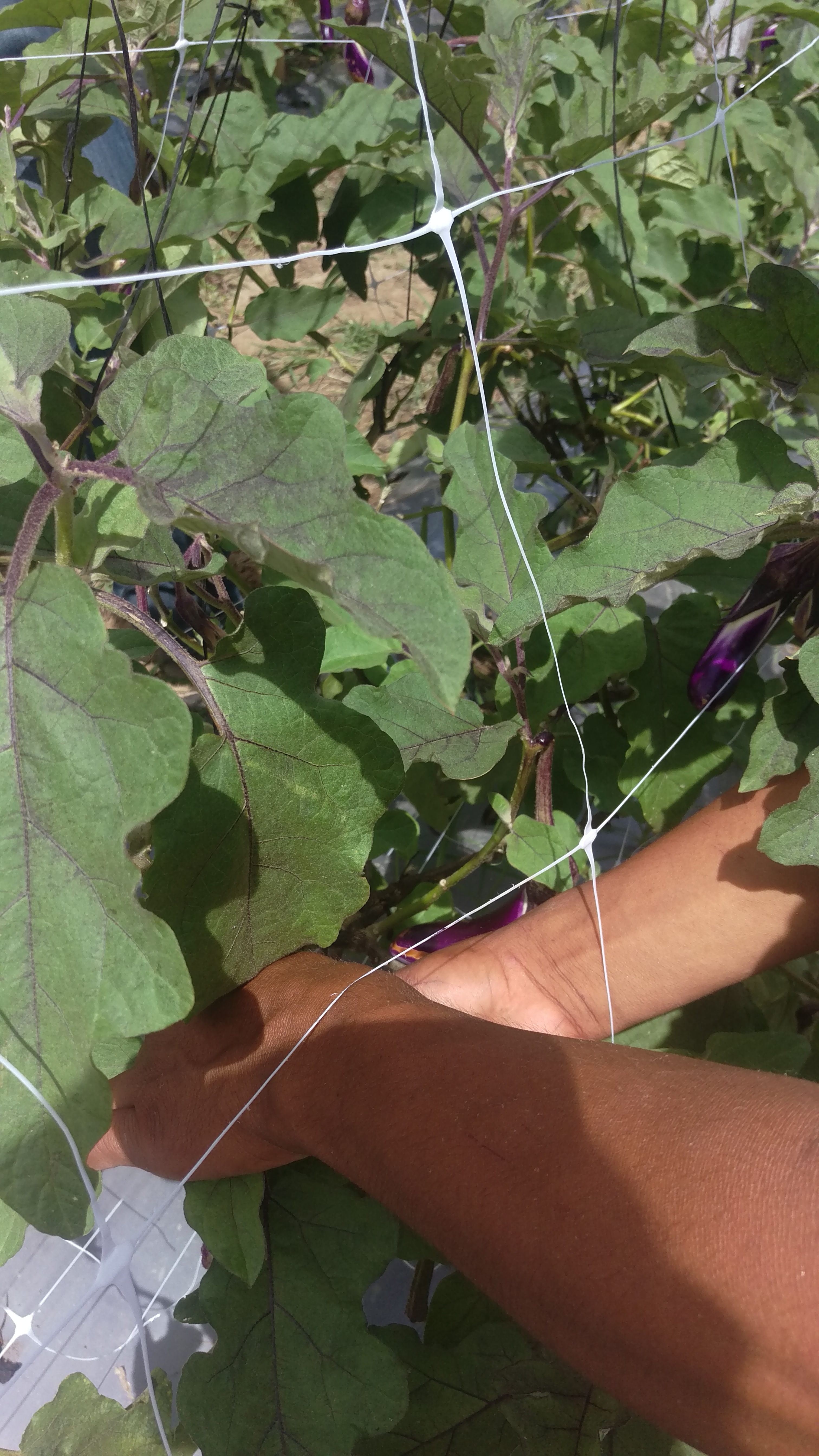 Durante la poda o cosecha, es importante tener cuadros suficientemente amplios (como por ejemplo un 25x25cm) para facilitar las labores, incrementar el rendimiento de tiempos y no dañar planta y frutos.